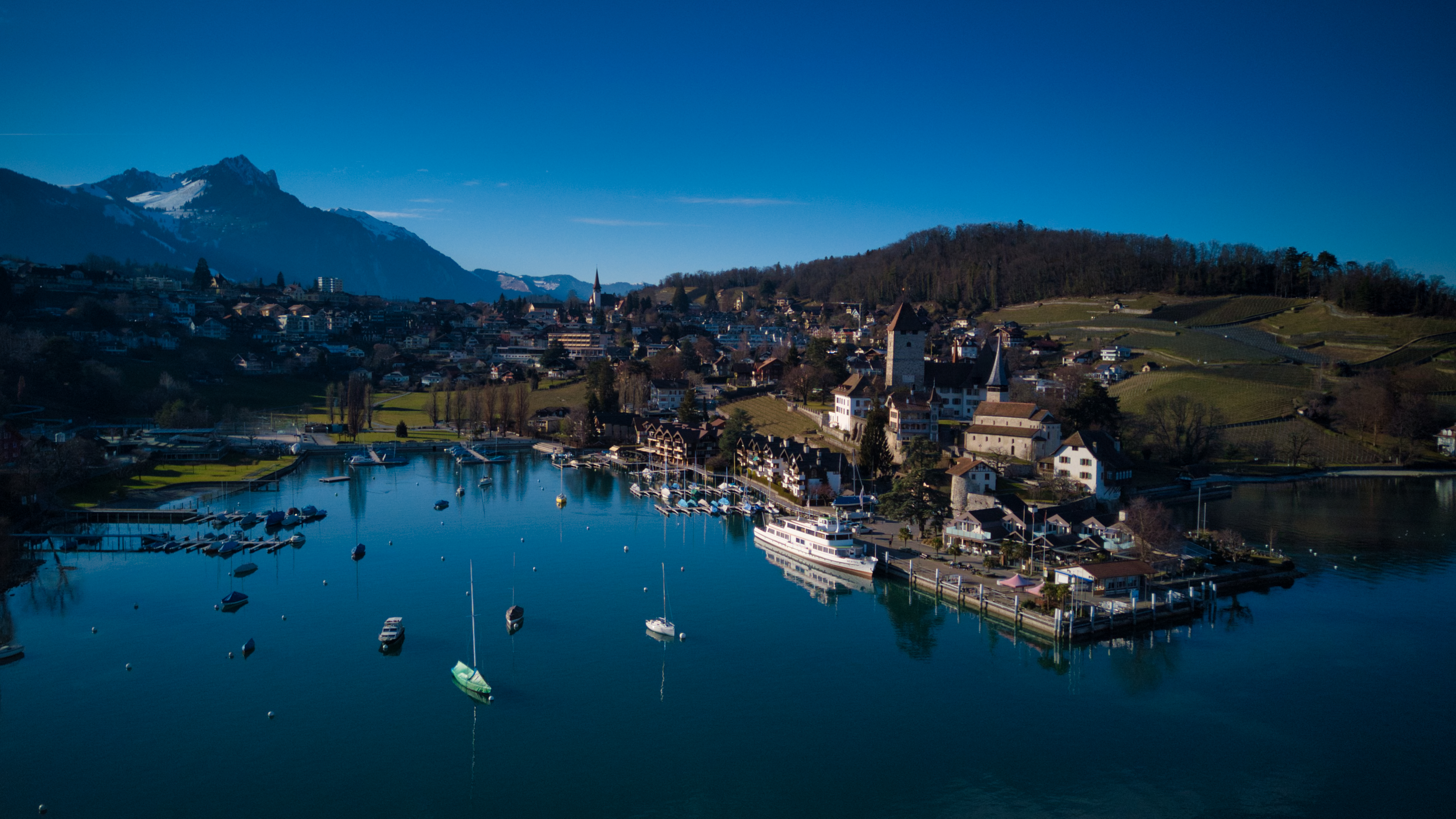 Blick in die Spiezer Bucht im Februar 2020.